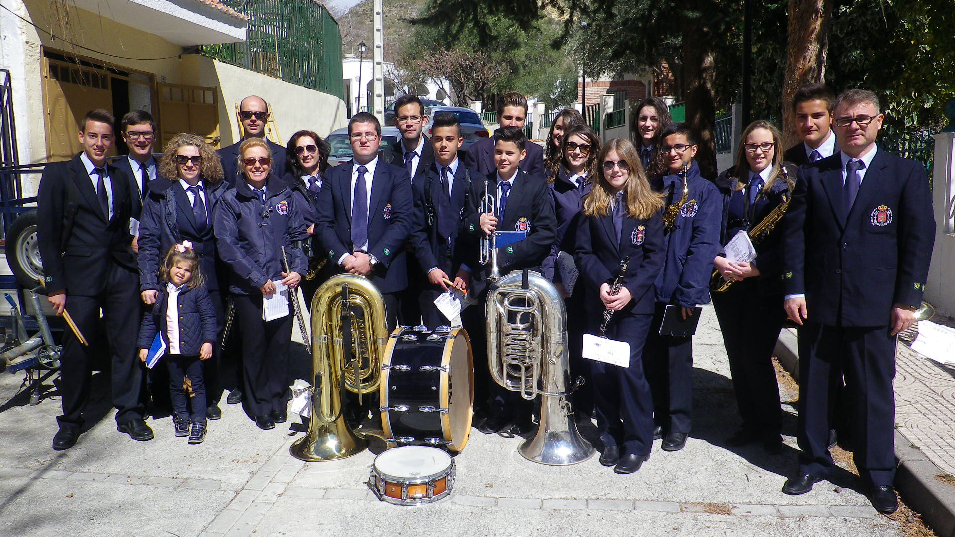 Fotografía de la banda municipal de música de Laujar de Andarax, provincia de Almería, Andalucía, España, tras una procesión en Baños de Santiago, Paterna del Río.